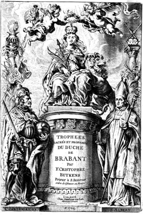 Christophe Butkens - 1726